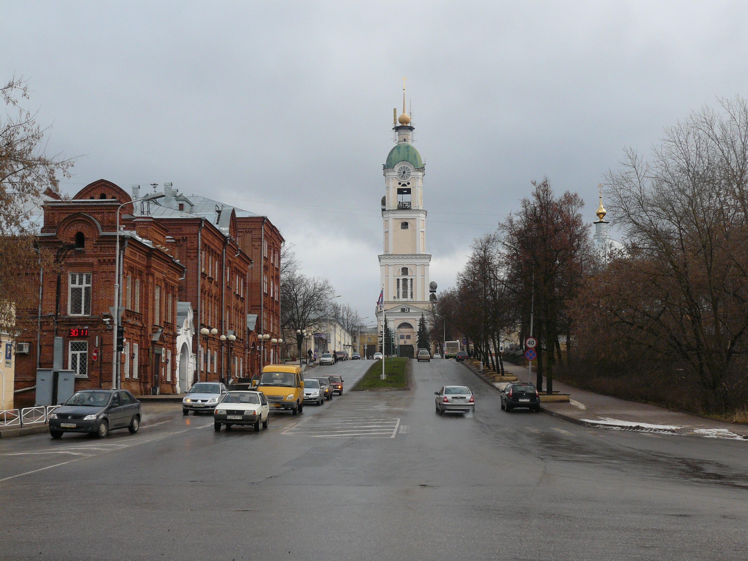 колокольня: проспект Мира, 27, Саров, Нижегородская область